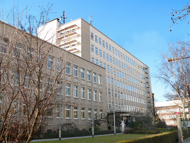 Regionsgebäude in Hannover, Hildesheimer Straße Foto aufgenommen von Benutzer Benutzer:AxelHH, März 2006